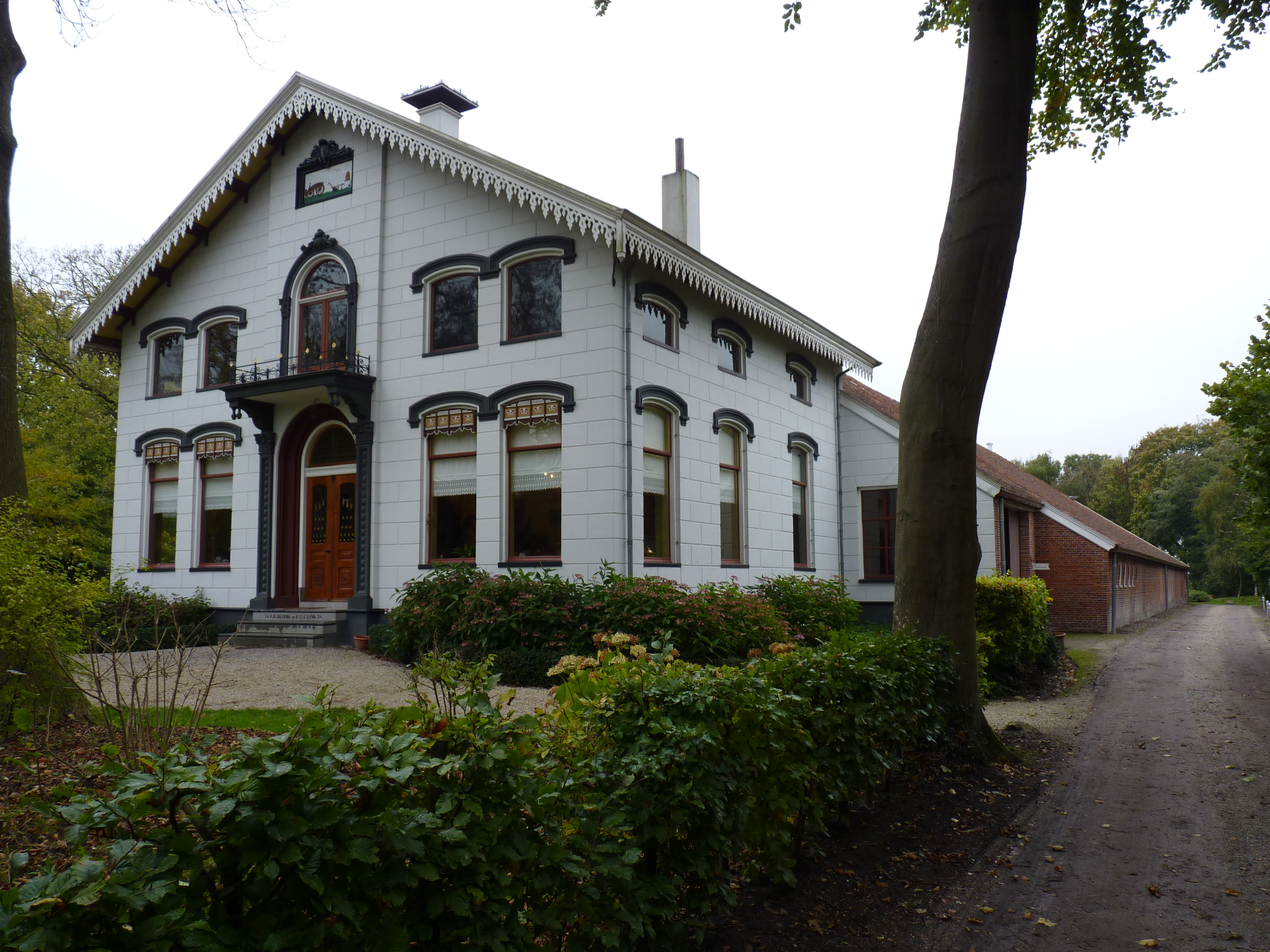 Midwolda Boerderij Hermans Dijkstra